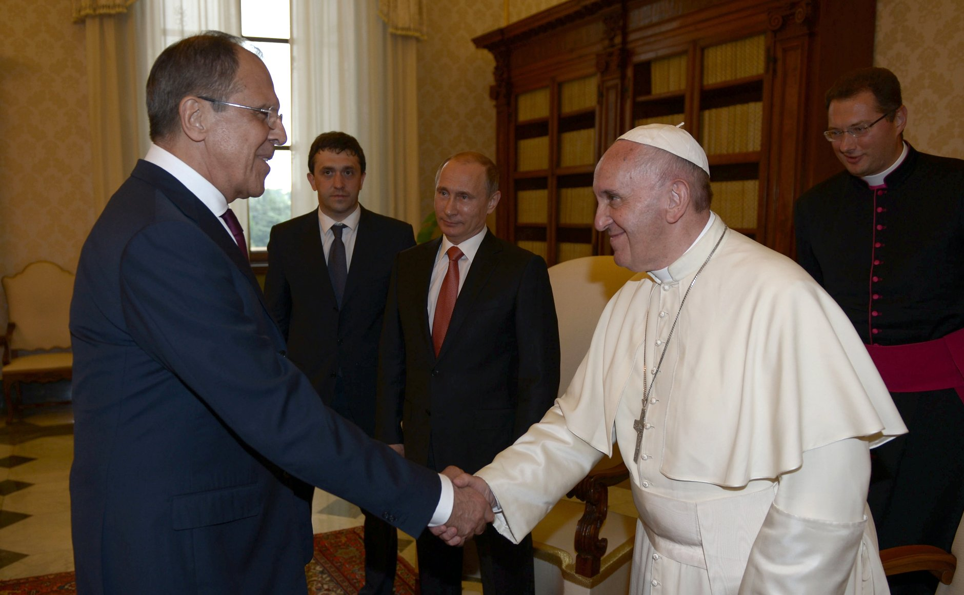 Встреча Президента России Владимира Путина с Папой Римским Франциском